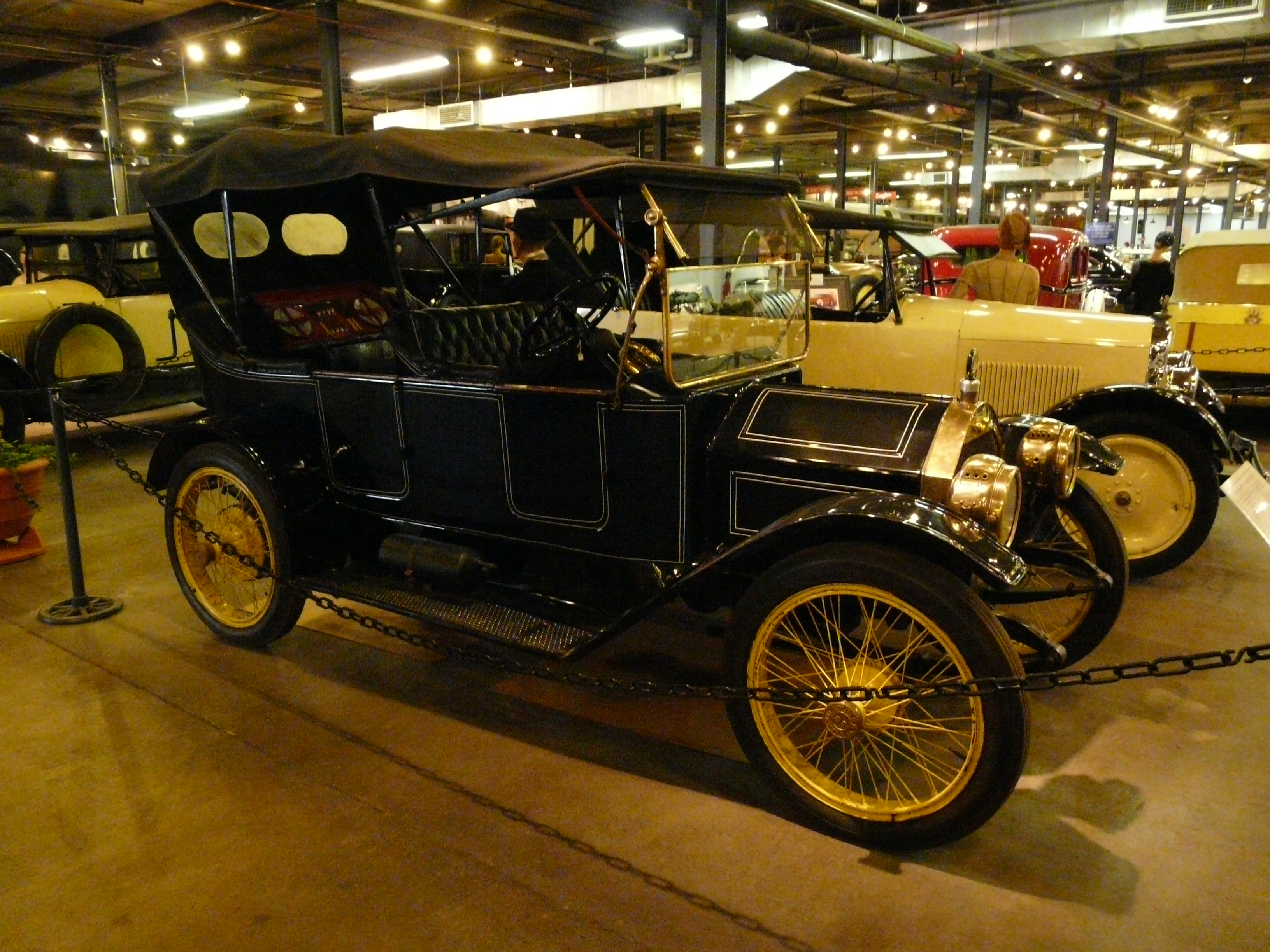 1913-1914 Empire 5-passenger touring Model 25 or 31; Denver, summer 2012